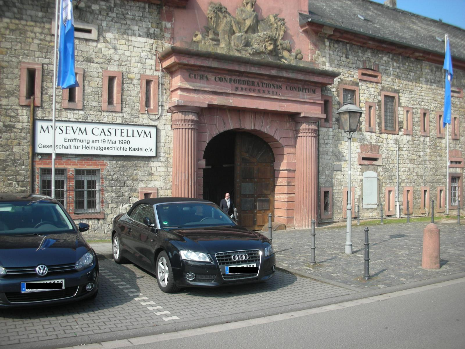 Eingang zum Museum auf Mainz-Kastel